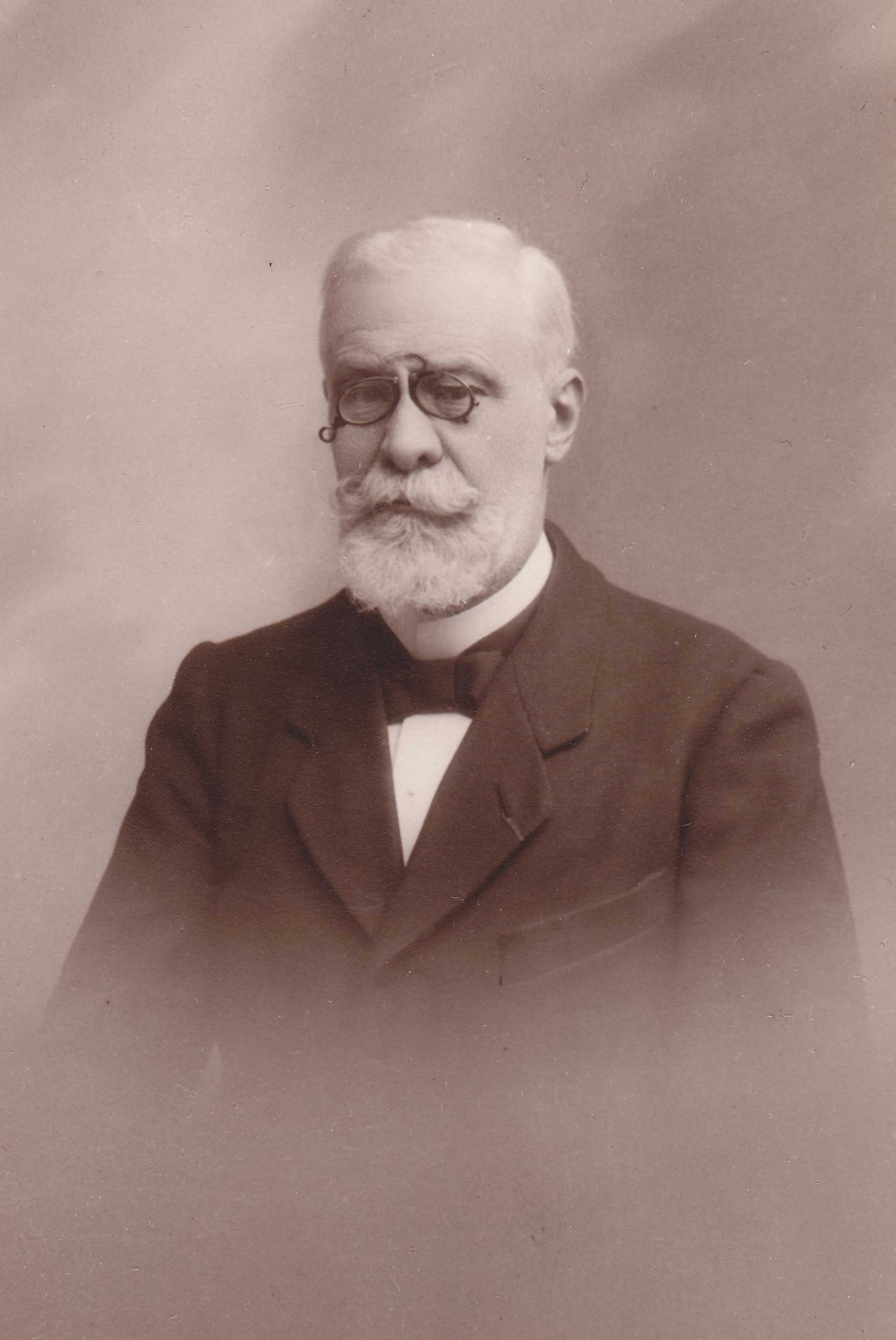 Portrait noir et blanc réalisé à Beauvais chez Bernerat